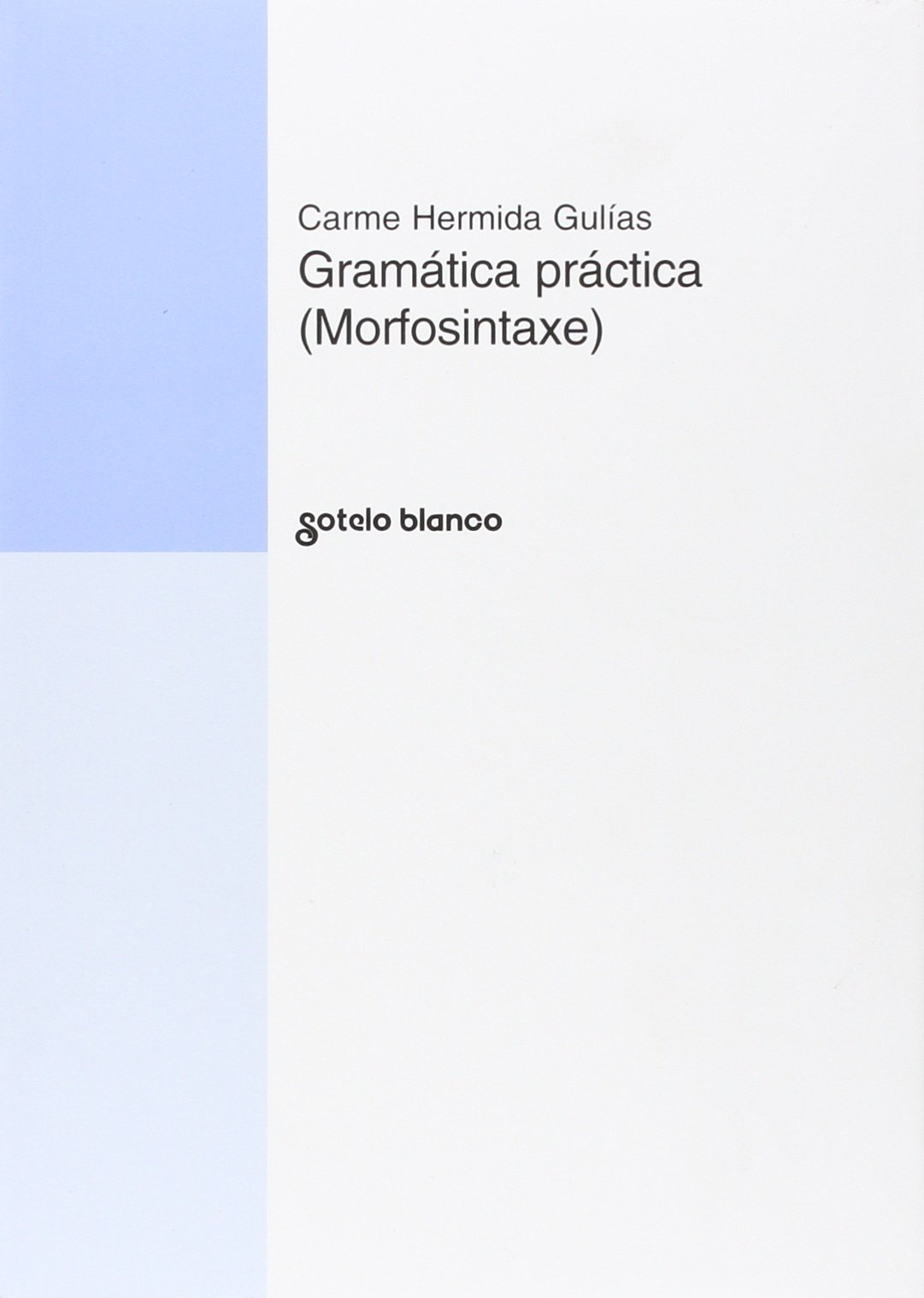 Gramática práctica (morfosintaxe).